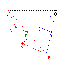 composée de deux homothéties de rapport kk'=1. Image personnelle. Licence GFDL